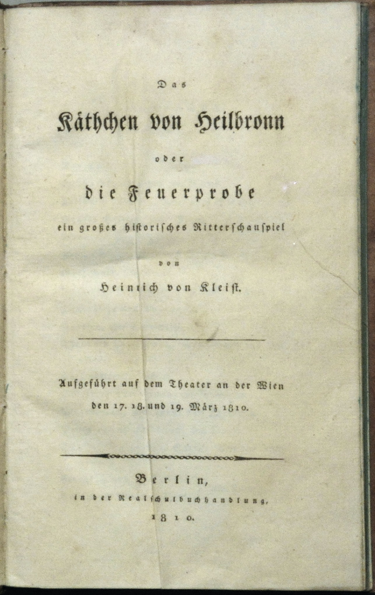 Erstausgabe